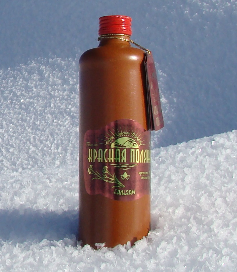 author:Zhalybina source: my own wiki page: balsam Krasnaya Polyana author:Zhalybina source: my own wiki page: balsam Krasnaya Polyana